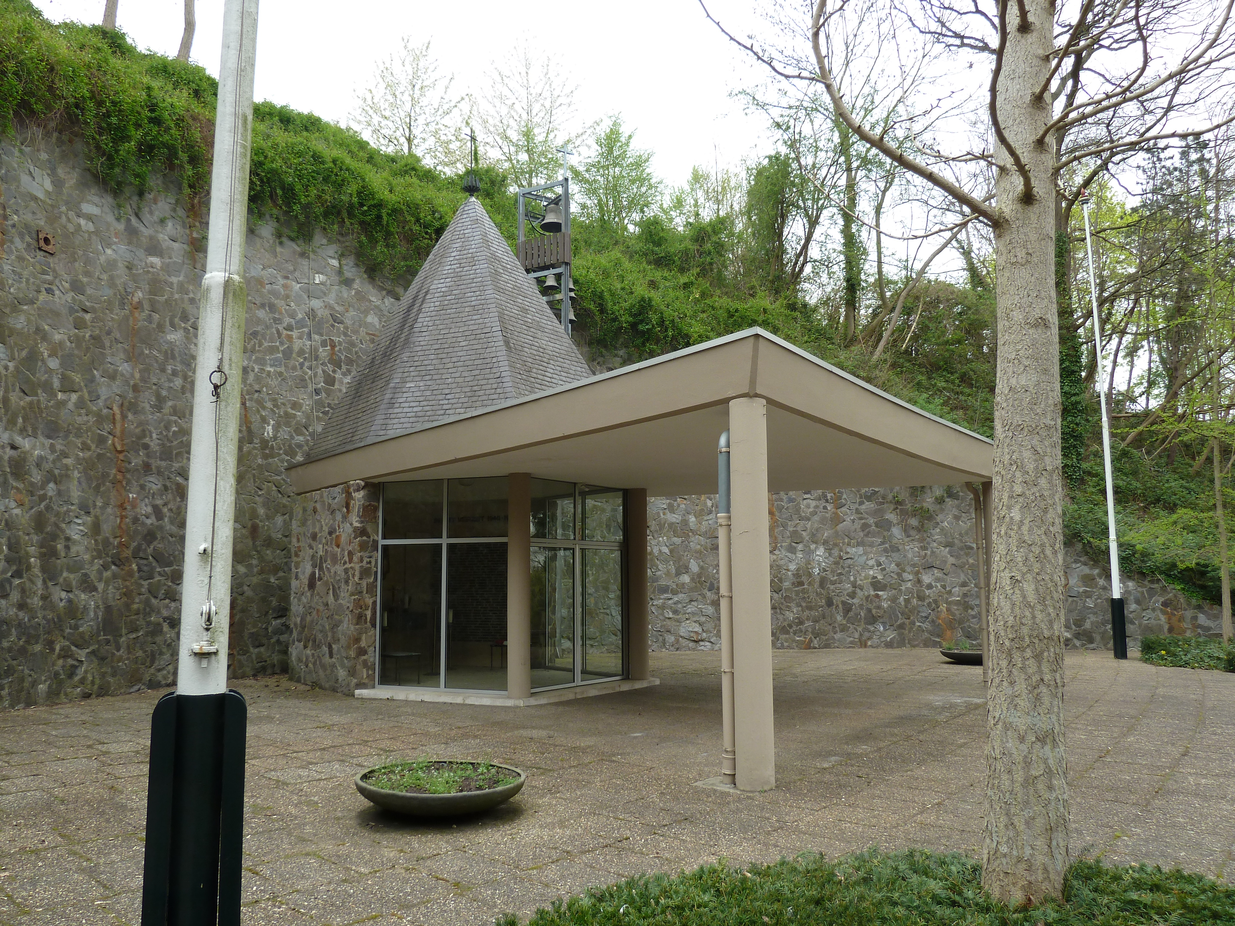 Provinciaal Verzetsmonument op de Cauberg, Valkenburg aan de Geul, Limburg, Nederland